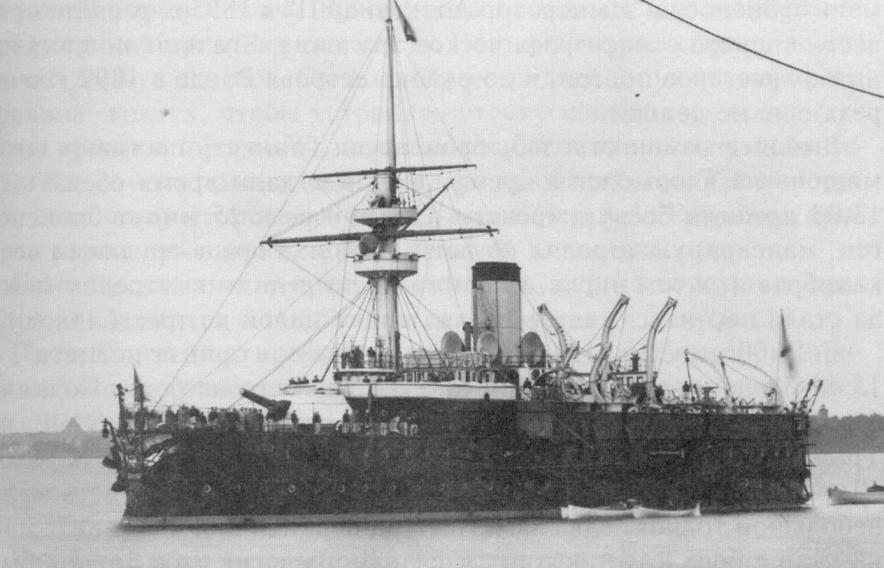 Эскадренный броненосец "Гангут" на рейде г. Ревеля (Таллинн)